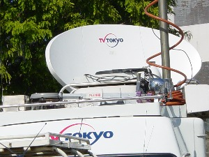 テレビ東京の中継車（パラボラ）